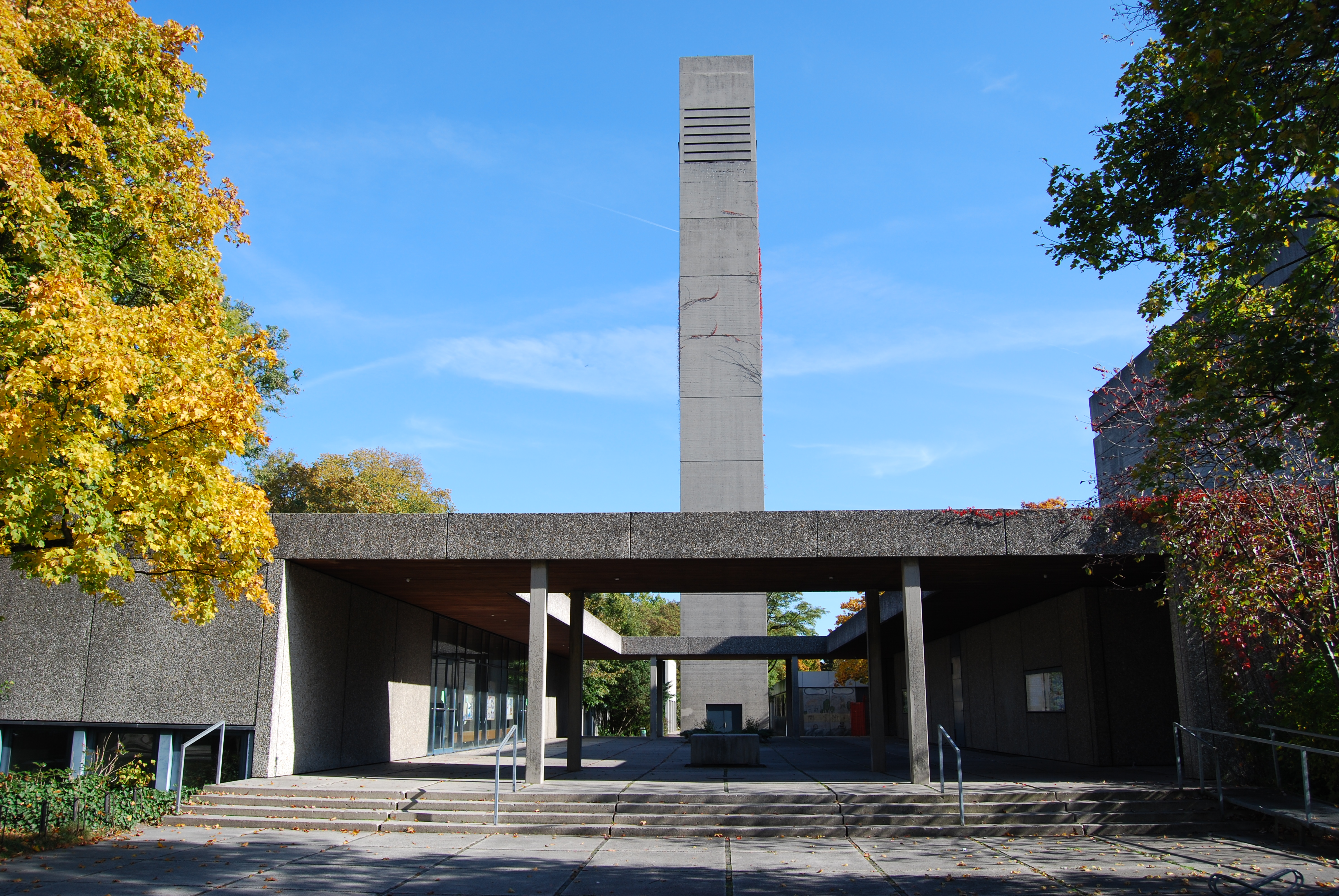 St. Mauritius in München-Moosach, Blick von Westen, Glockenturm in der Bildmitte